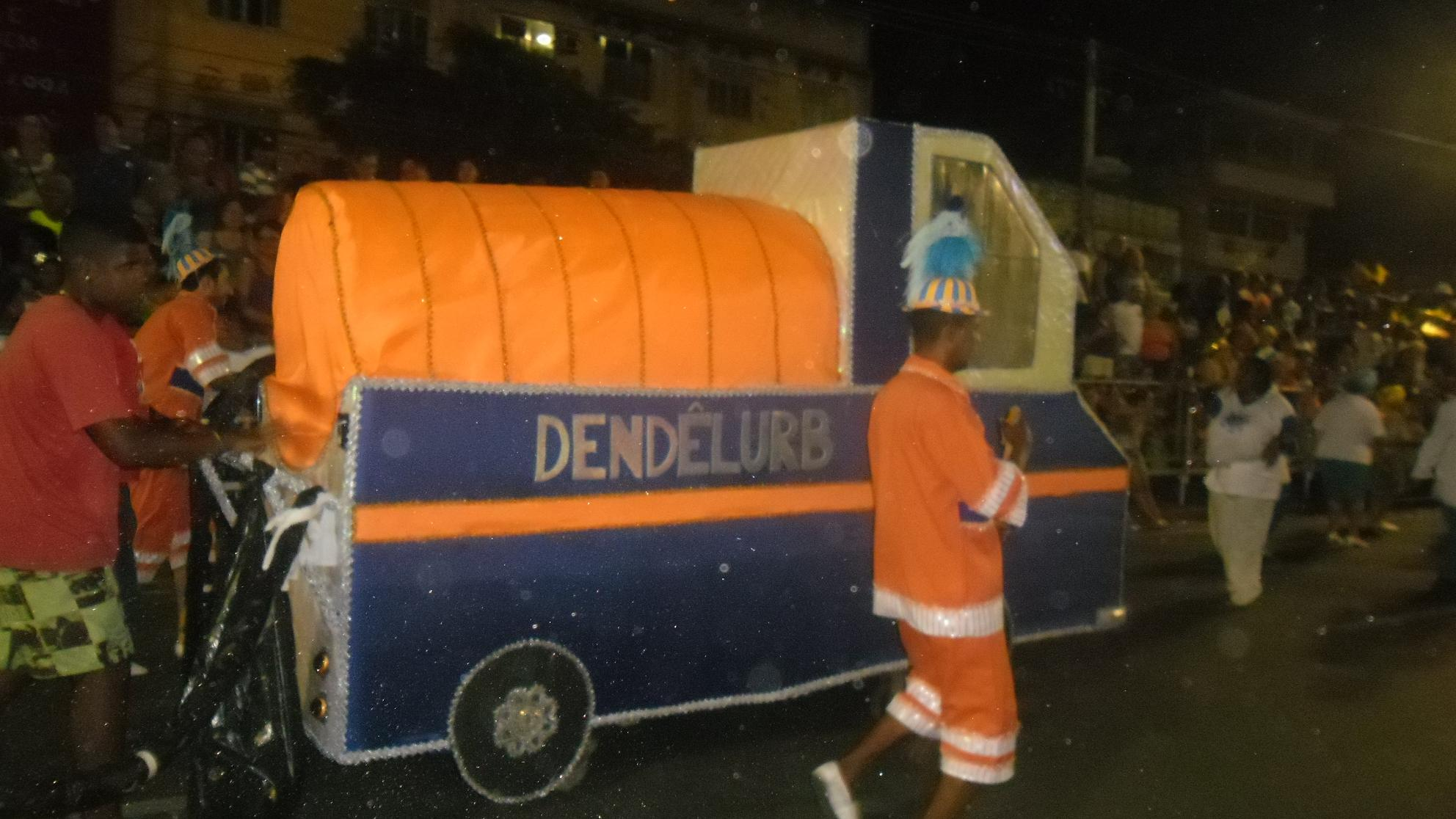 GRES Acadêmicos do Dendê